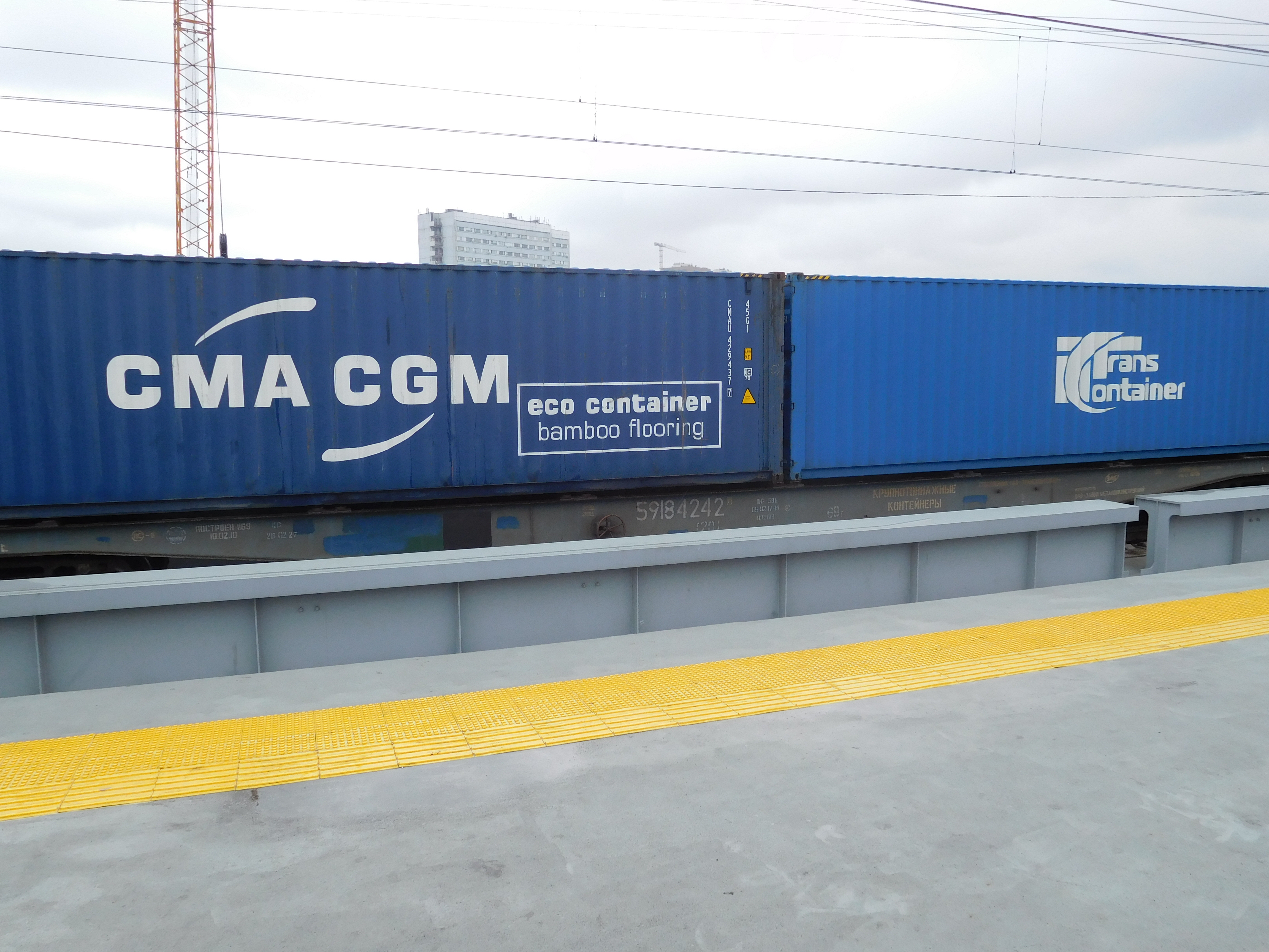 Контейнерные вагоны на третьем главном пути МЦК